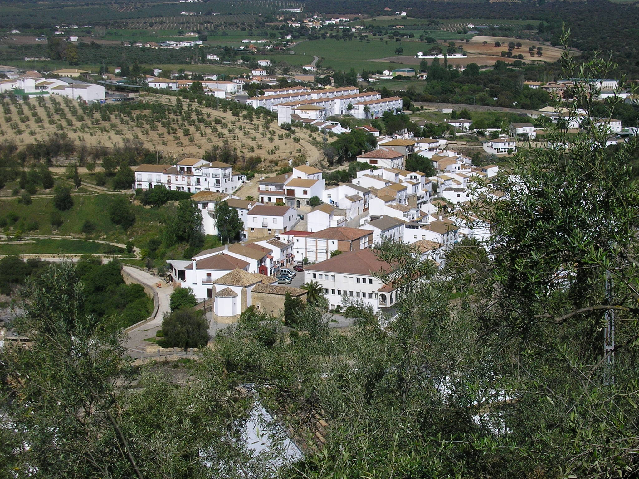 Vista de Setenil de las Bodegas, Andalucía, España.